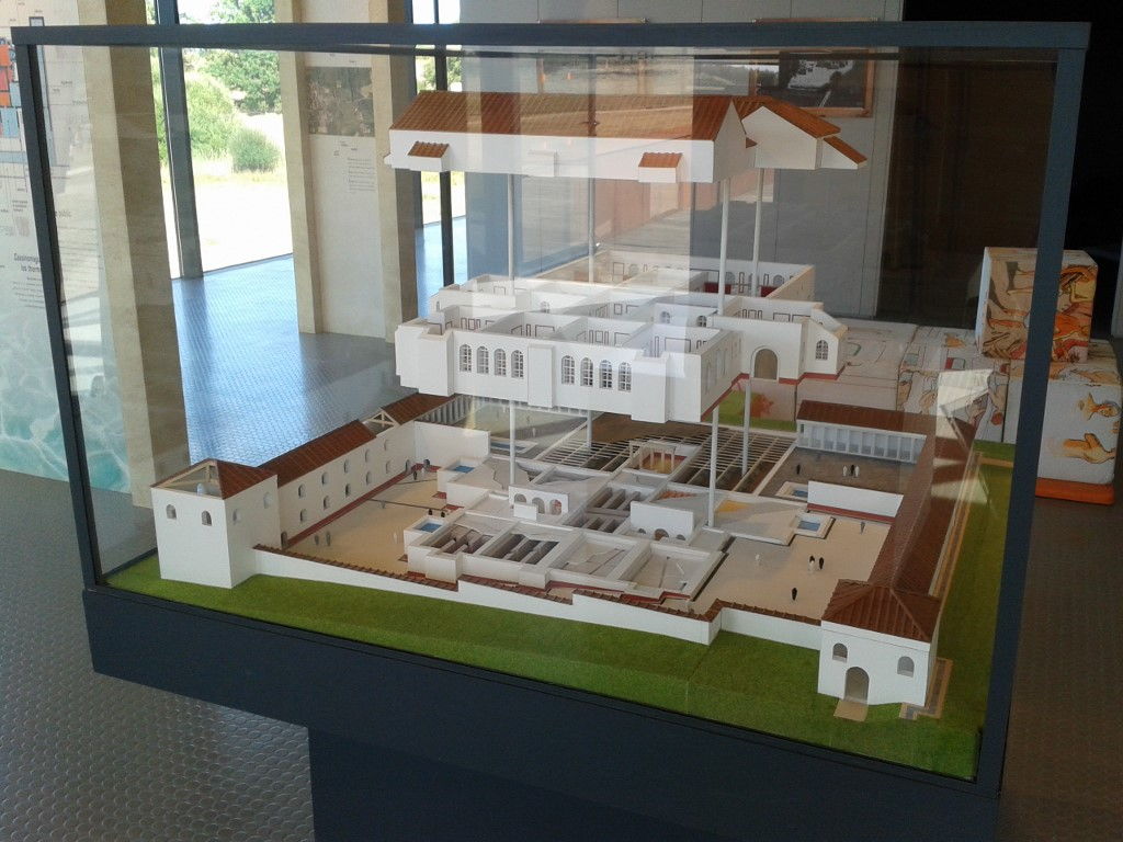 Cassinomagus, commune de Chassenon, Charente, France S-O. Les thermes de Chassenon, classés MH. Maquette des thermes en coupe ; vue depuis l'ouest-sud-ouest. .